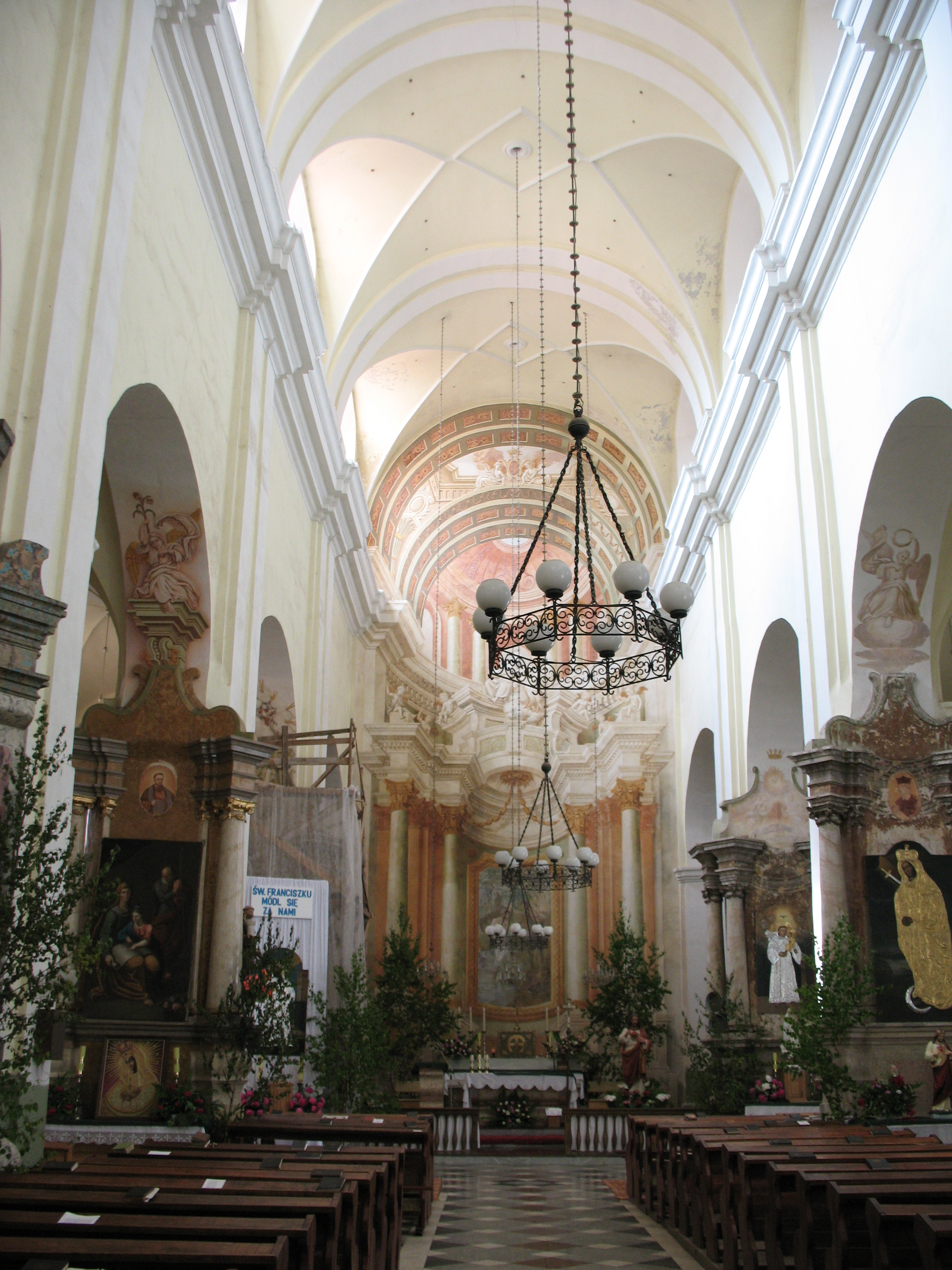 Беларуская (тарашкевіца): Ансамбль кляштара францысканцаў: касьцёл Яна Хрысьціцеля росьпіс алтарнай сьцяны касьцёла жылы корпус агароджа з брамай-званіцай. в. Гальшаны This is a photo of Belarusian heritage monument. Reference number: 412Г000063 ( WLM)